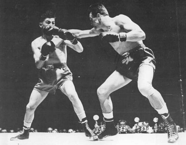 Al Andrews, Gustav Scholz Zentralbild Pu-Sta. 9 Mot. 31.3.1954 Gustav Scholz siegte überlegen nach Punkten (Amerika). Der ungeschlagene deutsche Mittelgewichtler Gustav Scholz konnte seinen ersten Kampf in Amerika im Madison Square Garden zu einem überlegenen Punktsieg über seinen Gegner Al Andrews gestalten. UBz: Gustav Scholz (rechts) in Aktion.